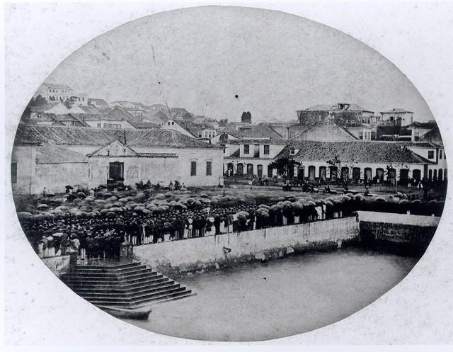 Recepção ao Imperador Dom Pedro II no cais de Porto Alegre, diante do antigo mercado público em 1865.